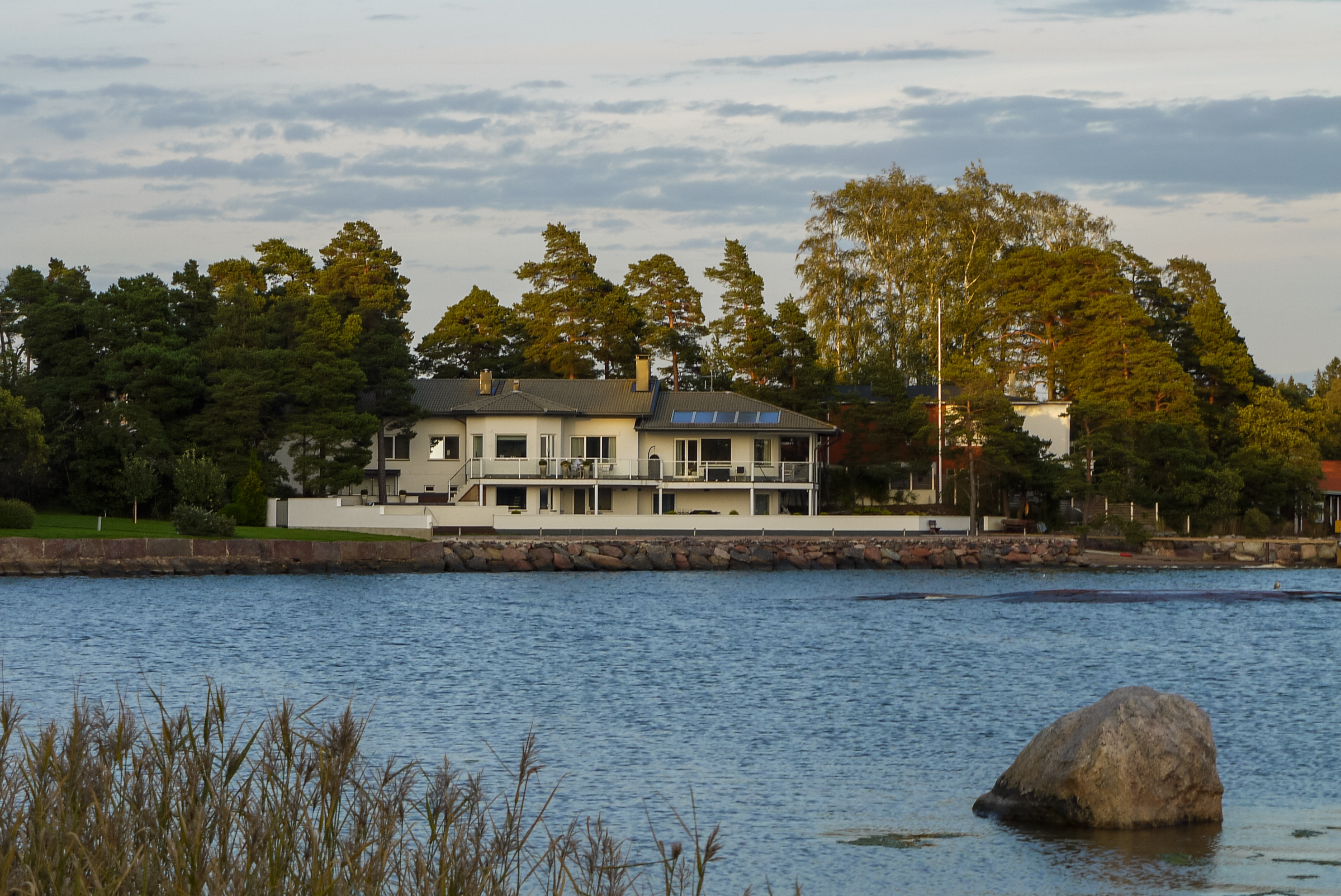 Talvivaaran toimitusjohtajan, Pekka Perän asunto Espoon Haukilahdessa.